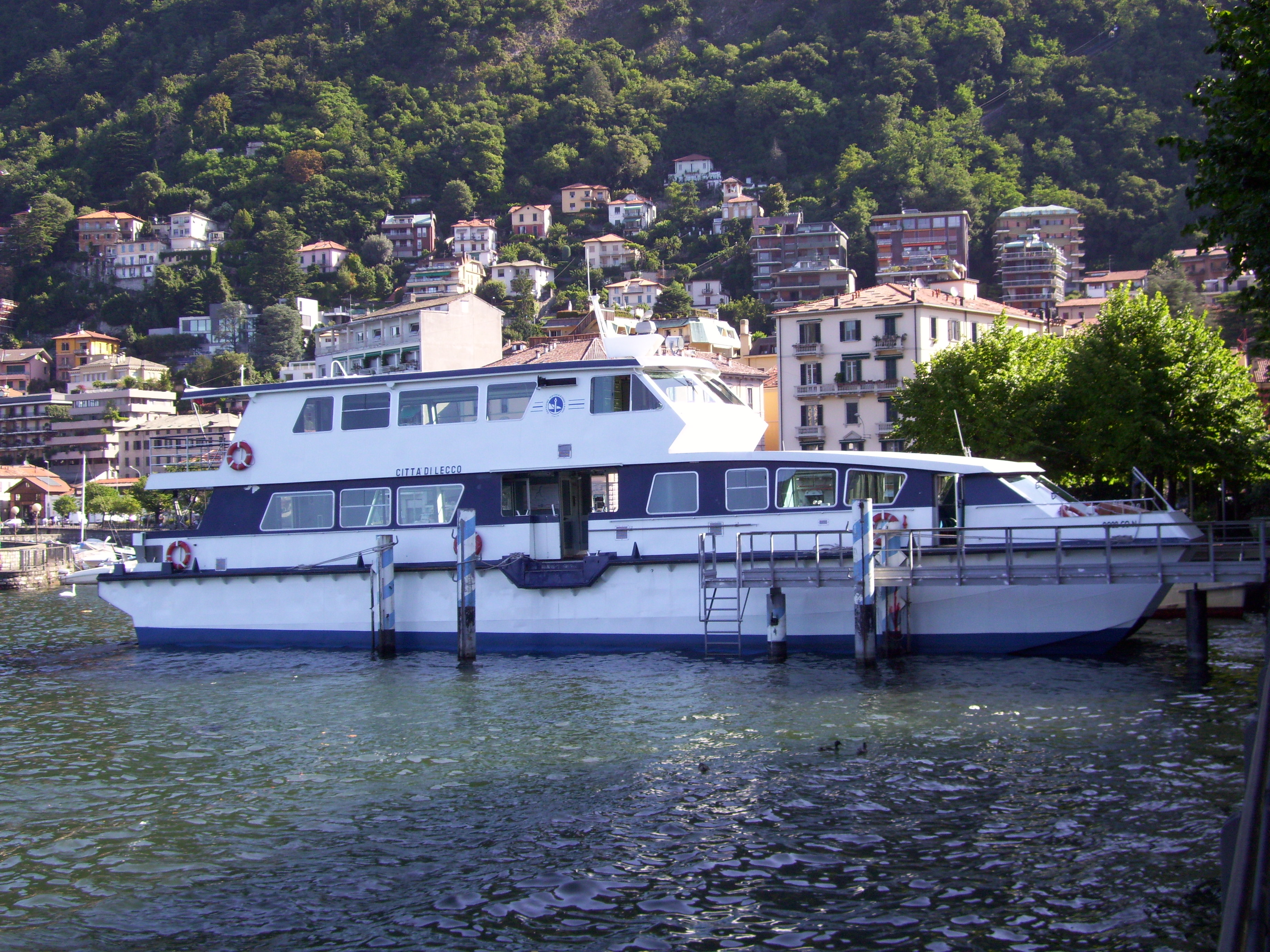 Catamarano Città di Lecco ormeggiato a Como sul lungolago Trieste